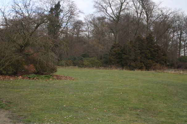 Vooraanzicht van het paviljoen. Van hieruit heb je zicht over het volledige park.